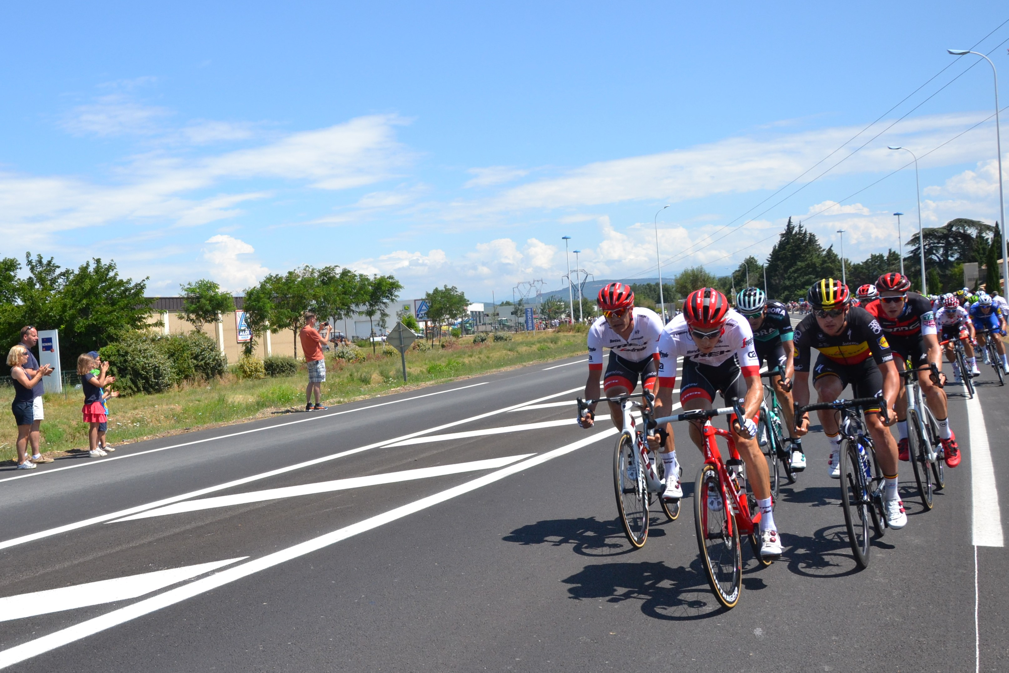 14ème étape du Tour de France 2018, entre Saint Paul-Trois-Châteaux et Mende, au niveau de Pierrelatte.